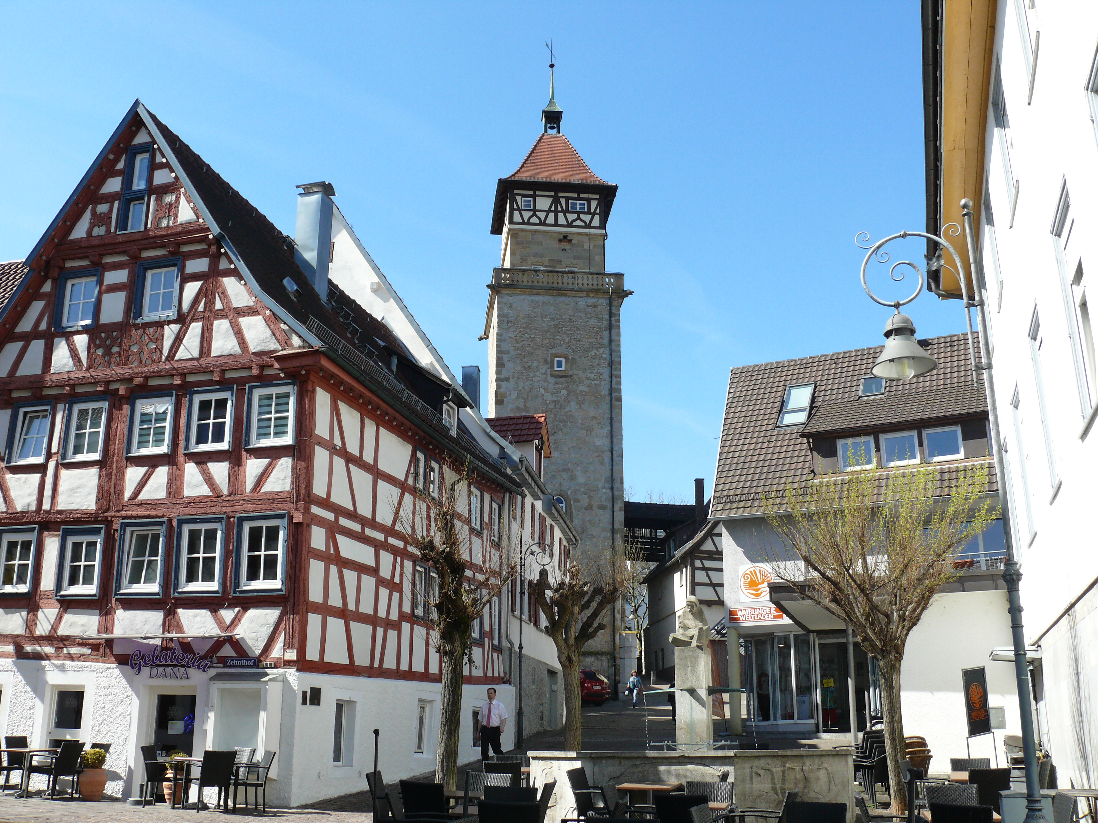 Der Hochwachtturm in Waiblingen. Blick von Osten an der Ecke Lange Straße/Beim Hochwachtturm.